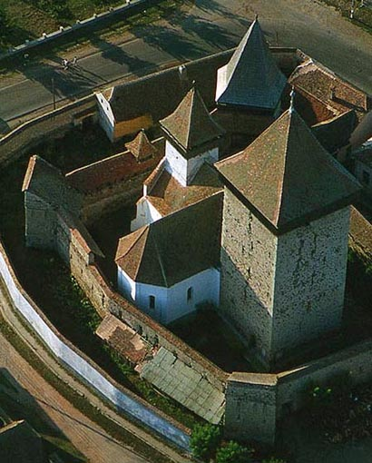 Homorod